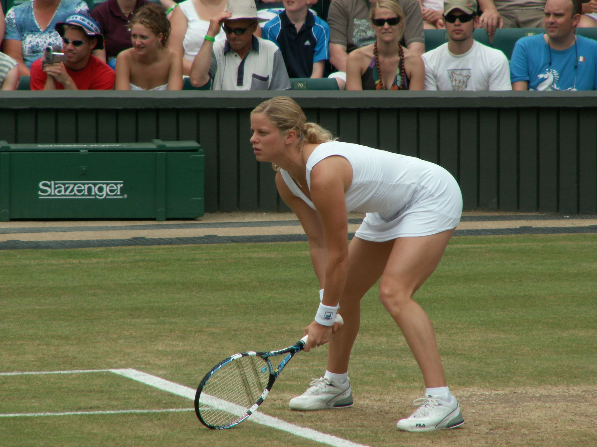 Kim Clijsters à la réception de service (Wimbledon 2006)